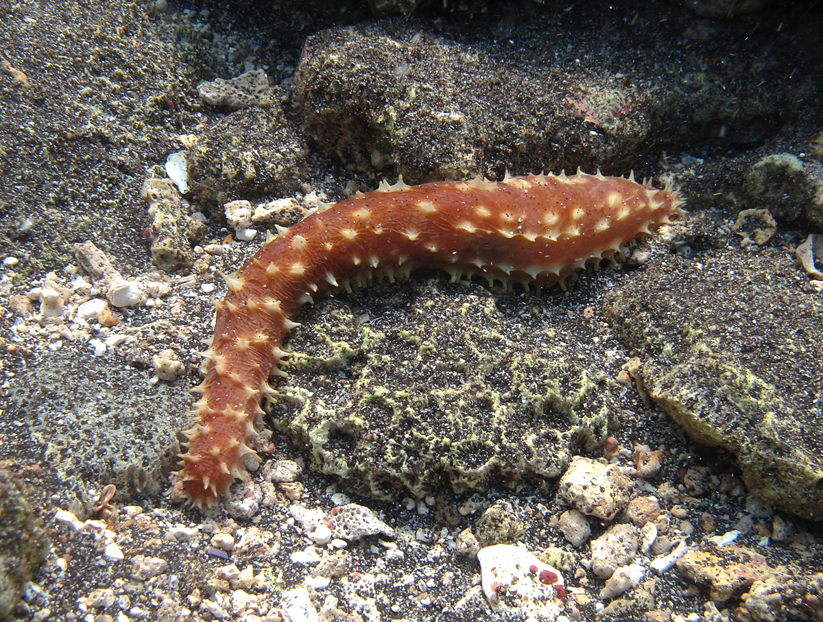 Holothurie Holothuria hilla à la Réunion.